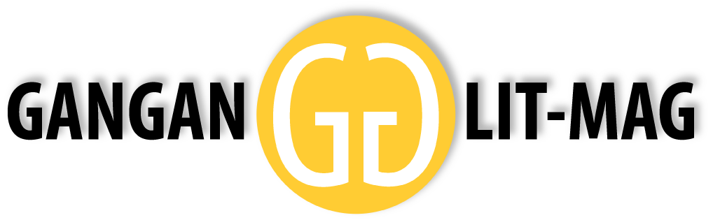 Gangan Lit-Mag Logo ab 2016